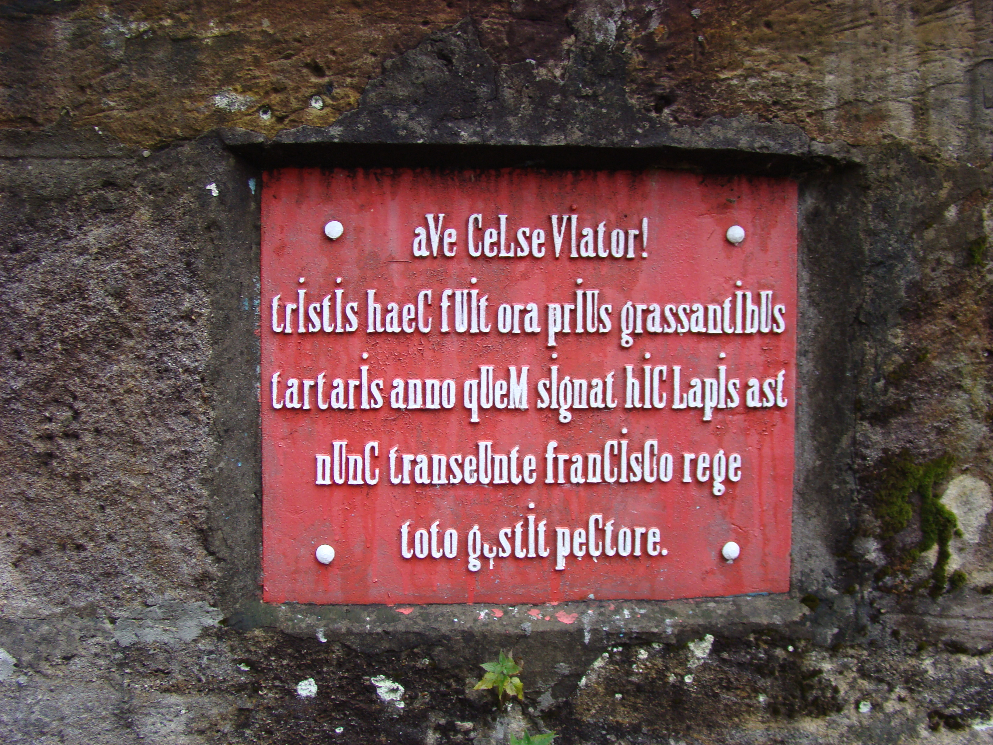 "Stâlpul Tătar", monument în cinstea victoriei din 1717 împotriva tătarilor